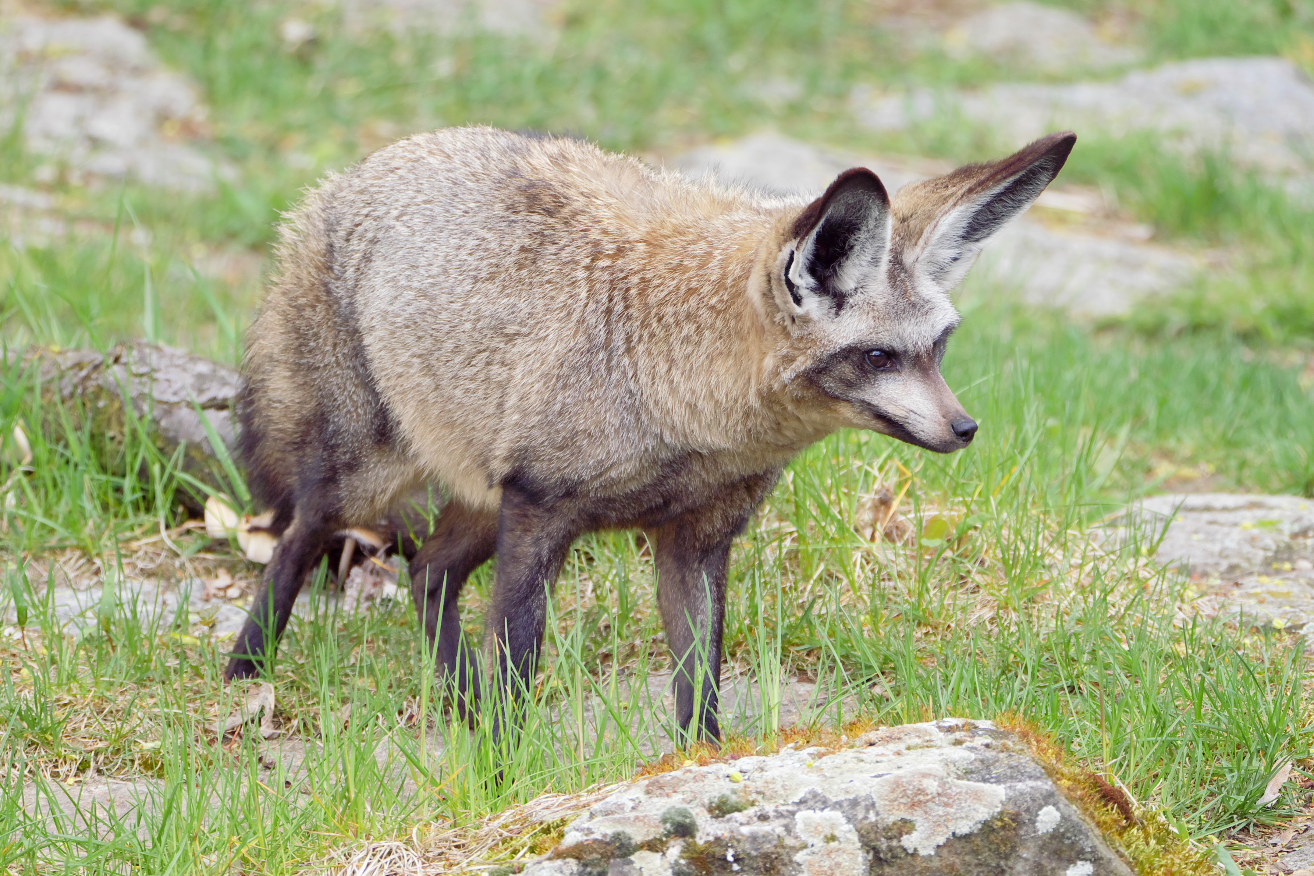 Südafrikanischer Löffelhund im Tierpark Friedrichsfelde in Berlin.